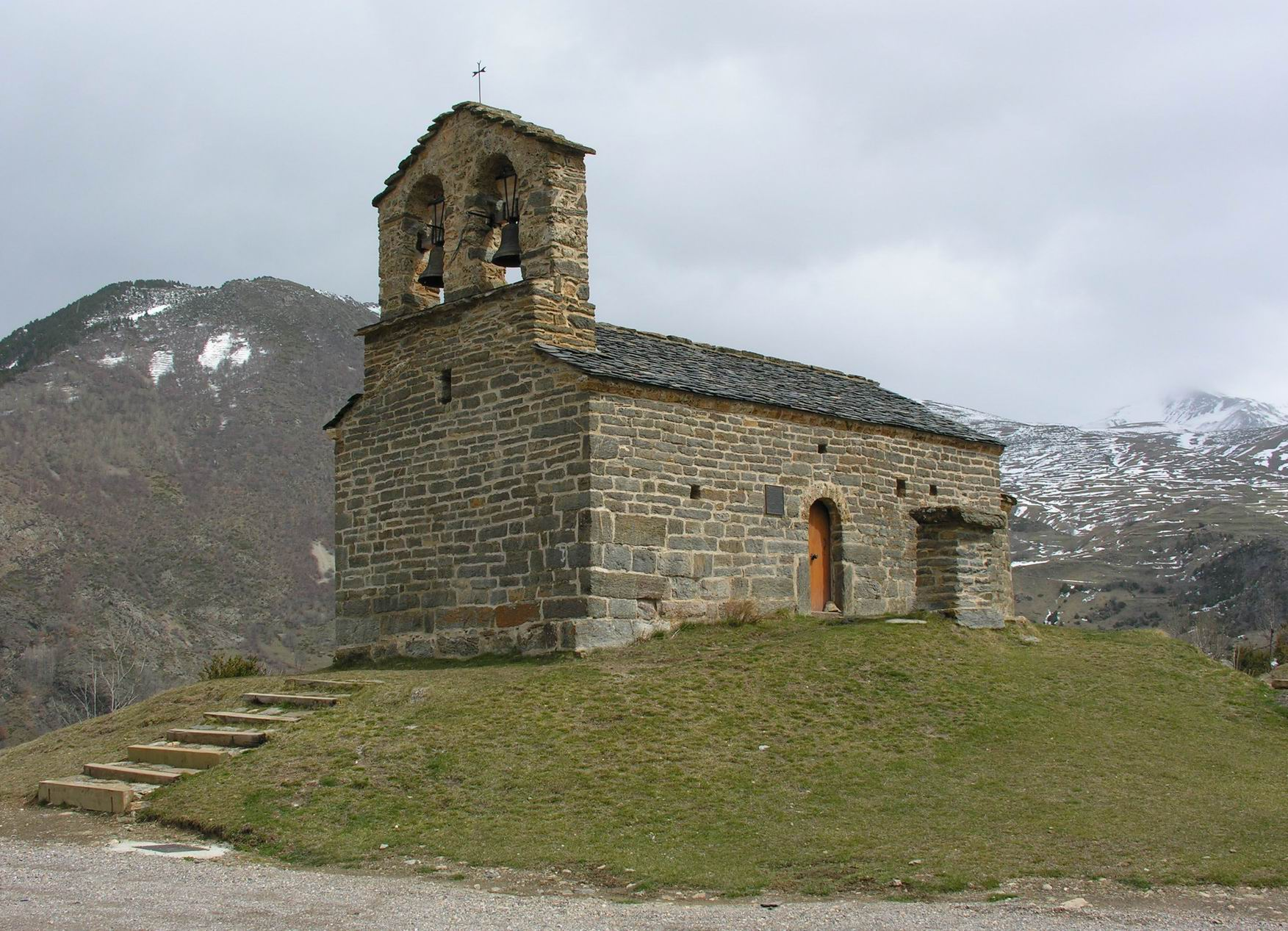 Vista sud-oest